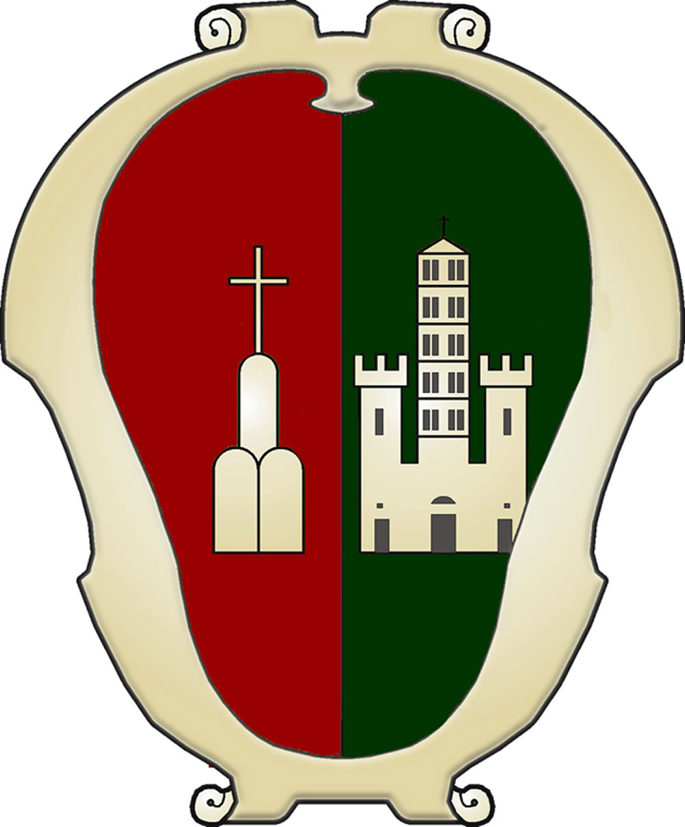 Partito: nel primo di rosso al monte di tre colli d’oro all’italiana cimato da una croce dello stesso; nel secondo di verde al campanile della Pieve di Arezzo d’oro e finestrato di nero e affiancato da due torri pure d’oro aperte e finestrate di nero